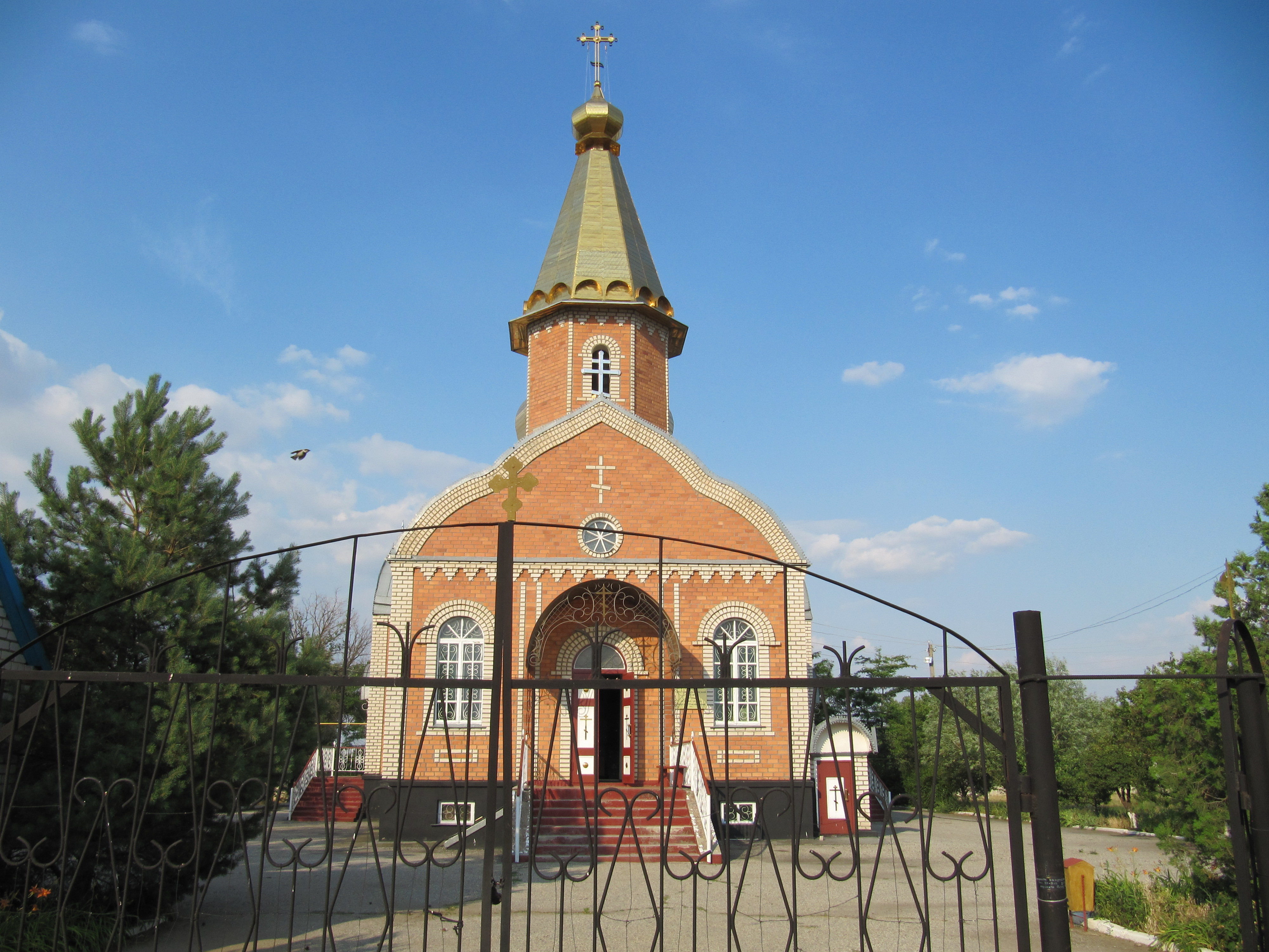 Крестовоздвижденская церковь в селе Приютное, Калмыкия